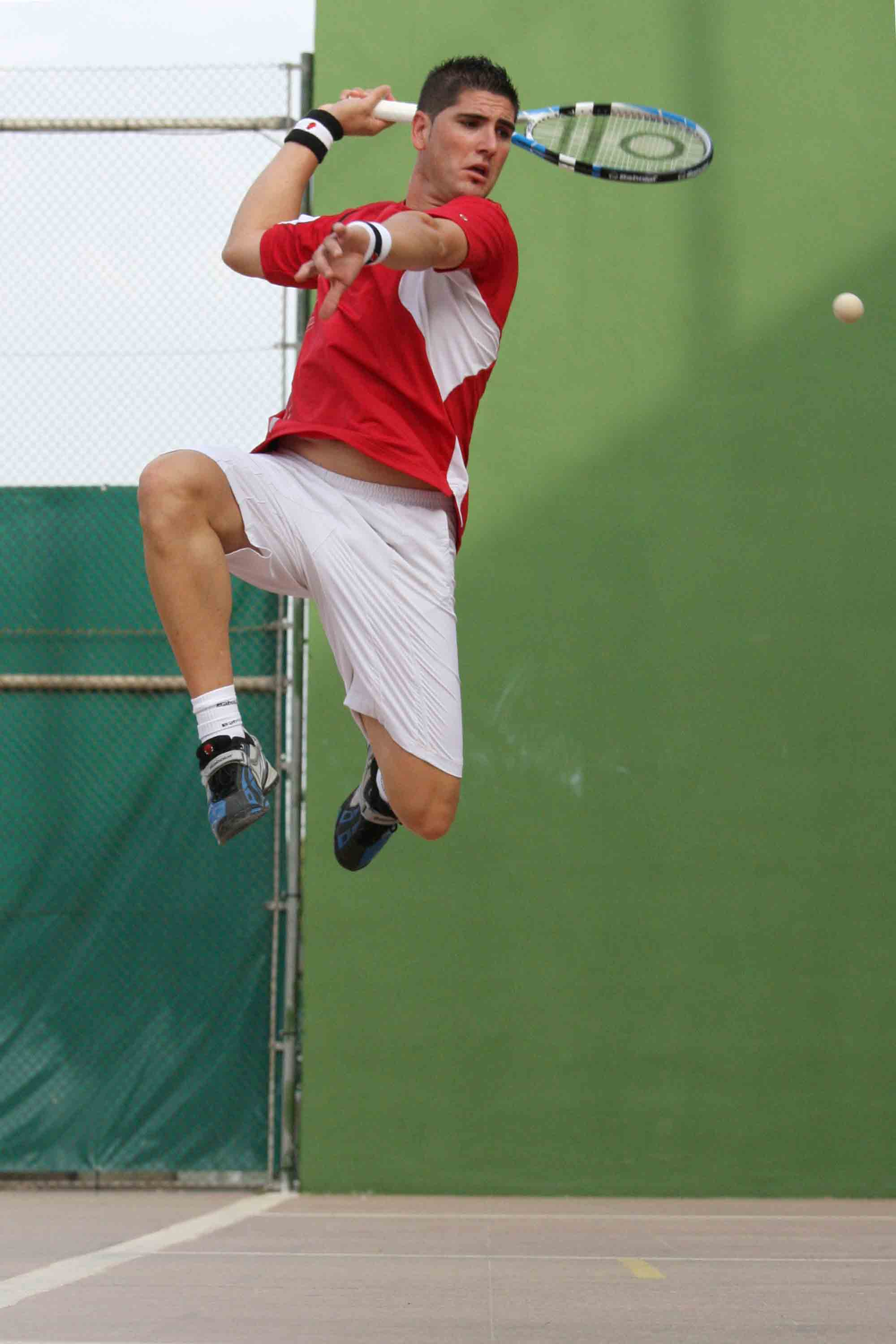 fronteni solimpico